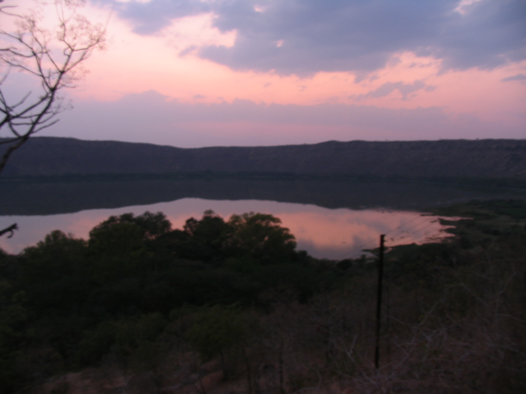 Lonar lake after sunset. Lake in Lonar, Maharashtra, India.